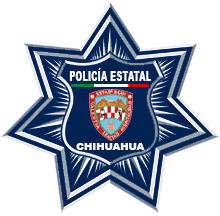 Escudo de la Policía Estatal de Chihuahua